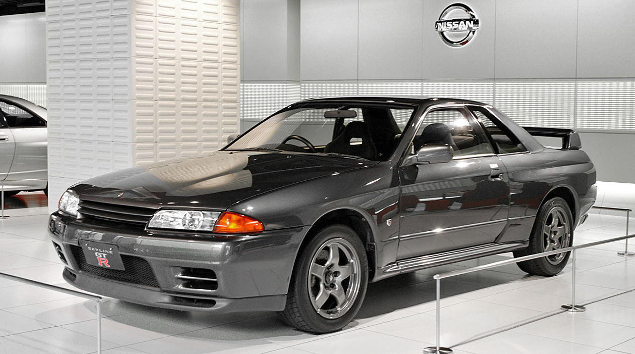 Nissan Skyline R32 GT-R, in Nissan Ginza Gallery.